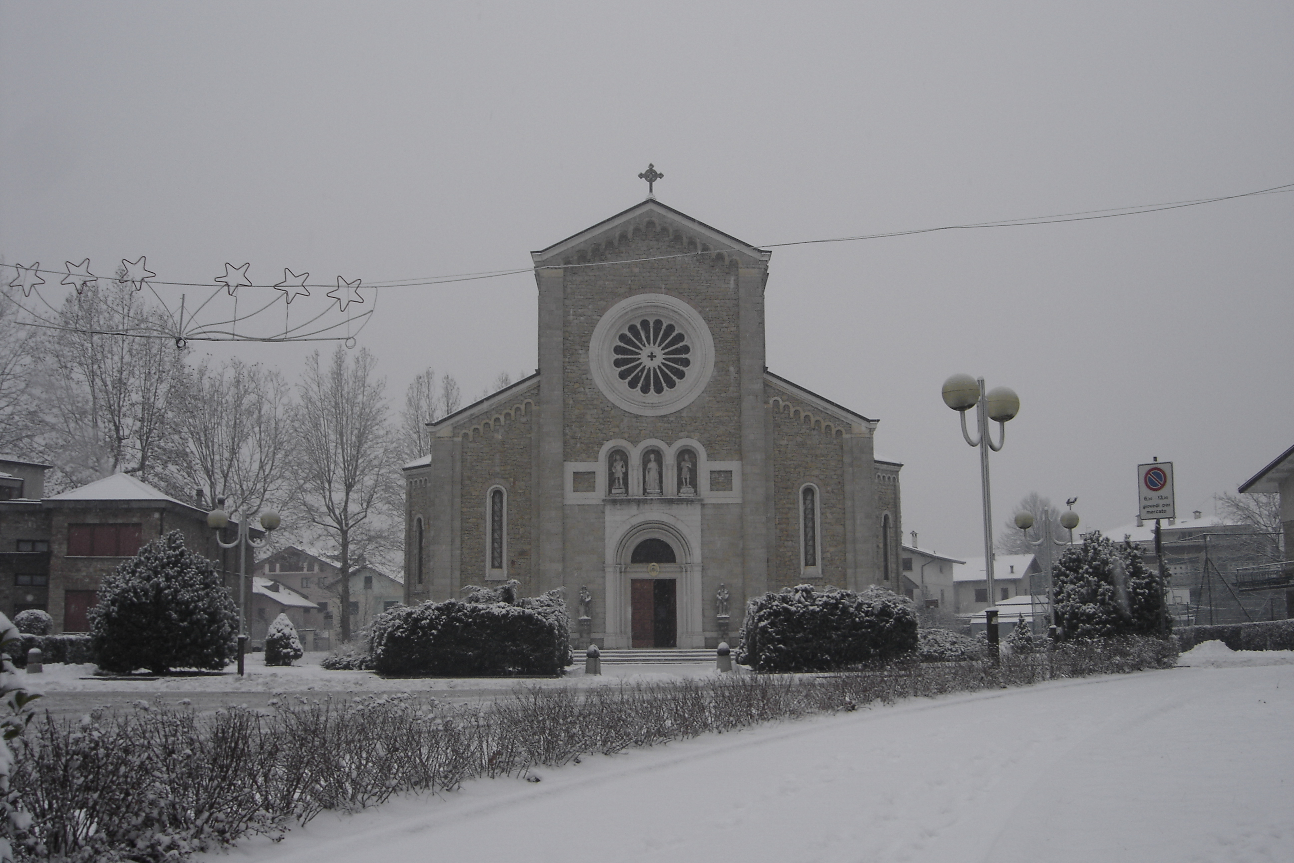 Sedico: la chiesa parrocchiale di Santa Maria Annunziata.